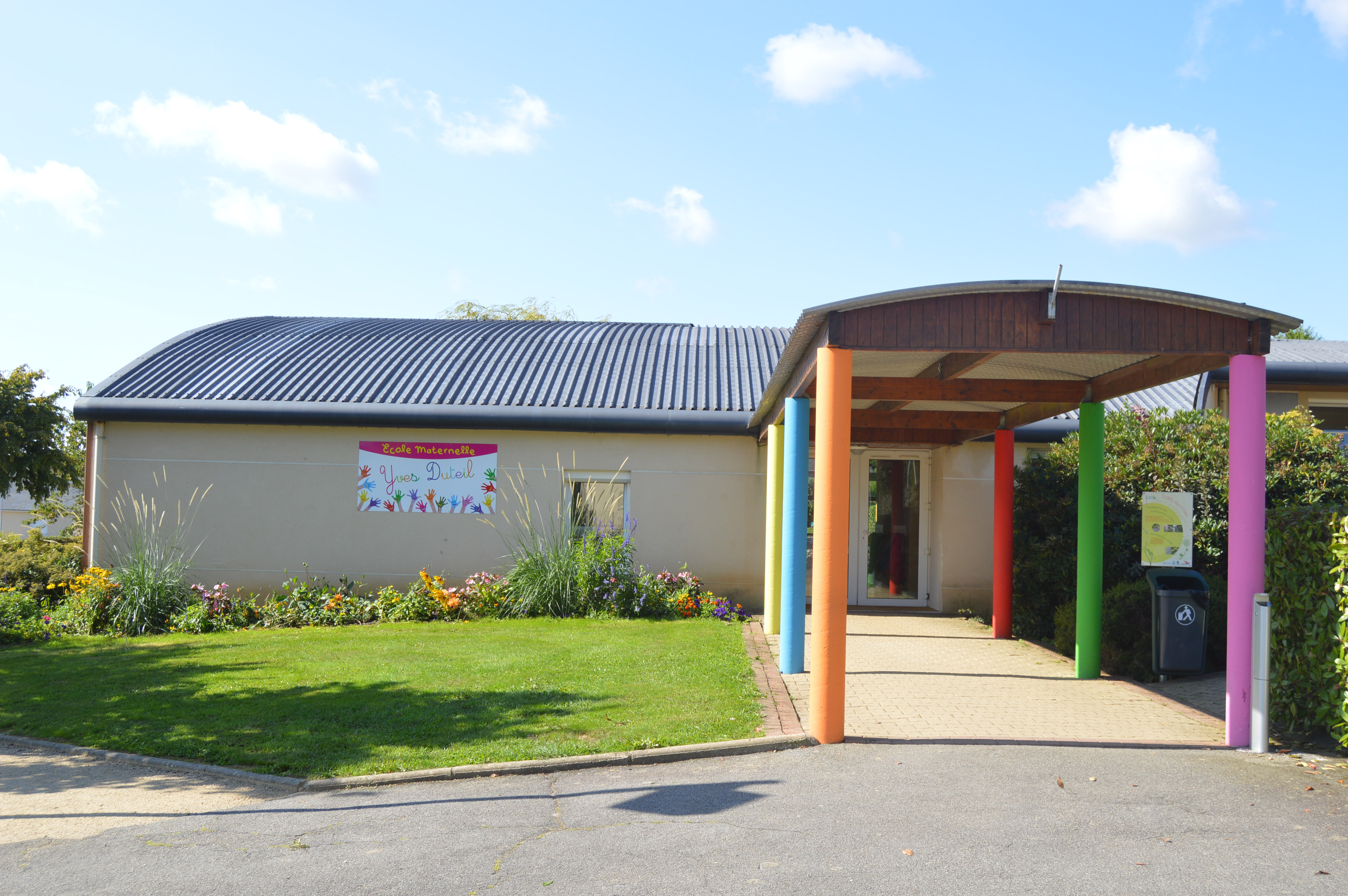 Ecole Yves Duteil